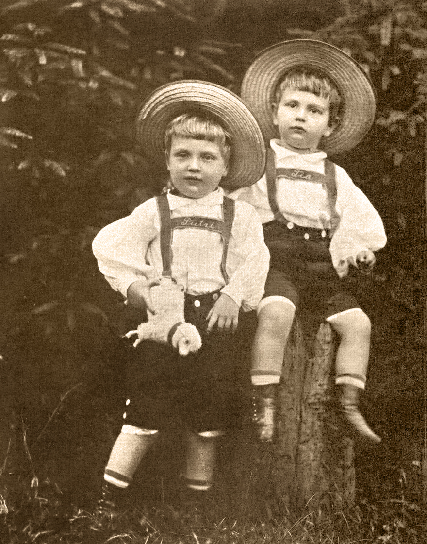 Darstellung der Söhne des letzten sächsischen Königs: Links Kronprinz Georg, rechts Prinz Christian. Auf den Hosenträgern sind ihre Spitznamen „Putzi“ und „Tia“ eingestickt.